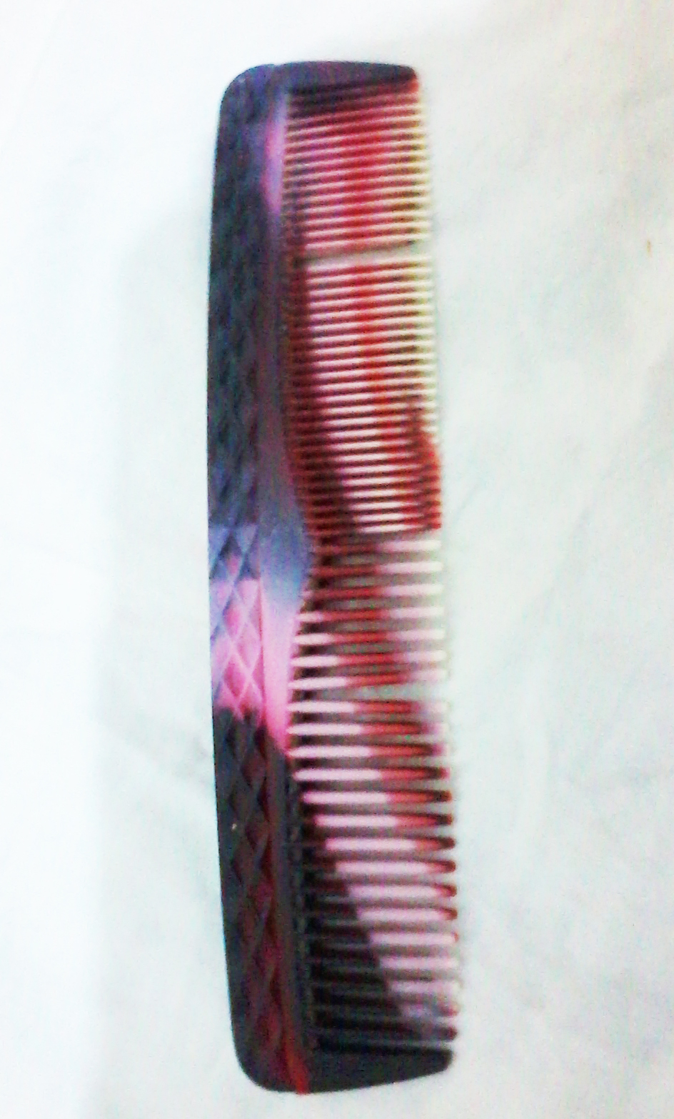 مشط مصنوع من اللدائن